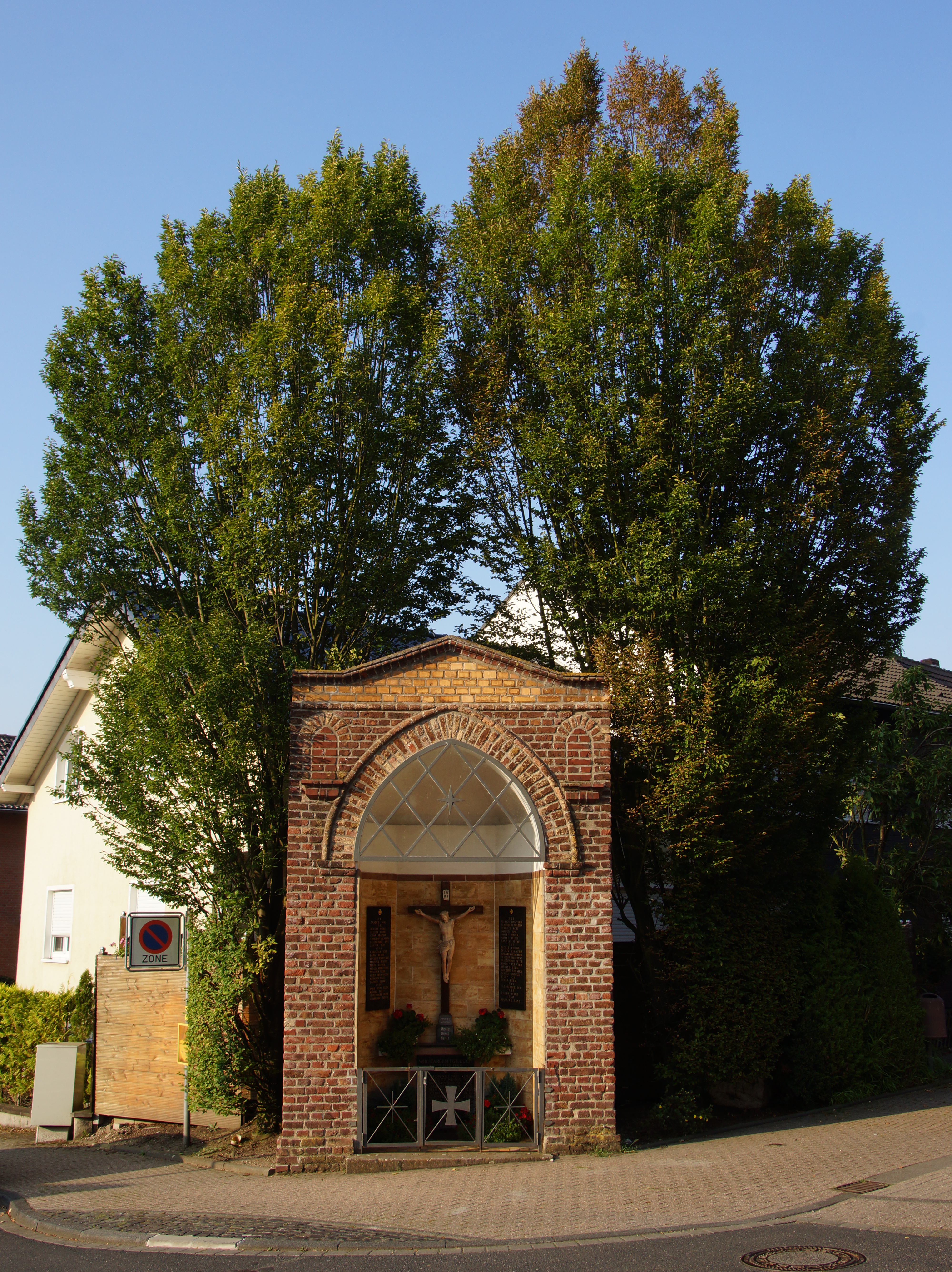 Wegekapelle Alstädten-Burbach, Brunnenstraße/Theresiastraße